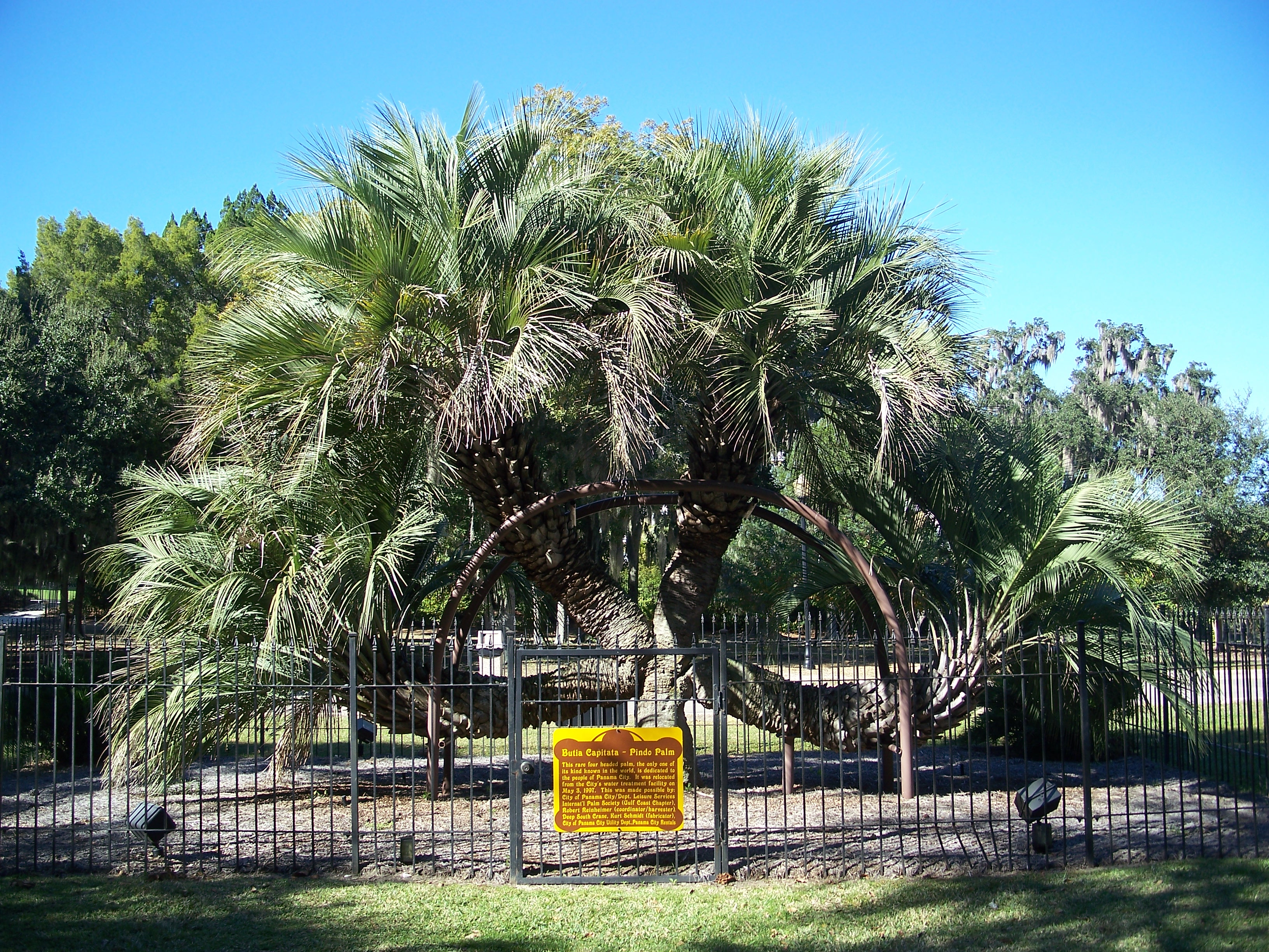 Panama City, Florida: Four headed Pindo Palm (Butia capitata)